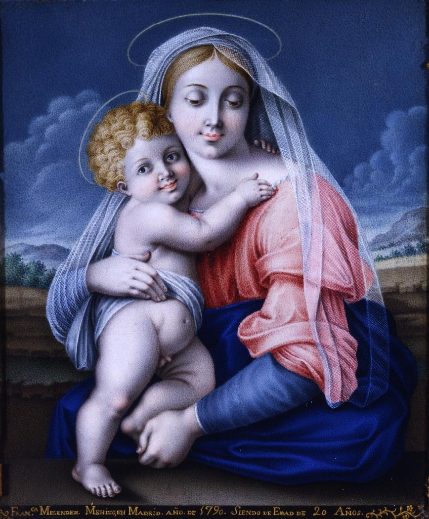 La obra representa a la Virgen María llevando en brazos al Niño Jesús.